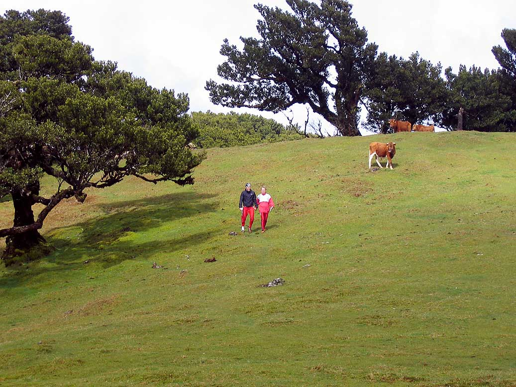 Fanal, Madeira